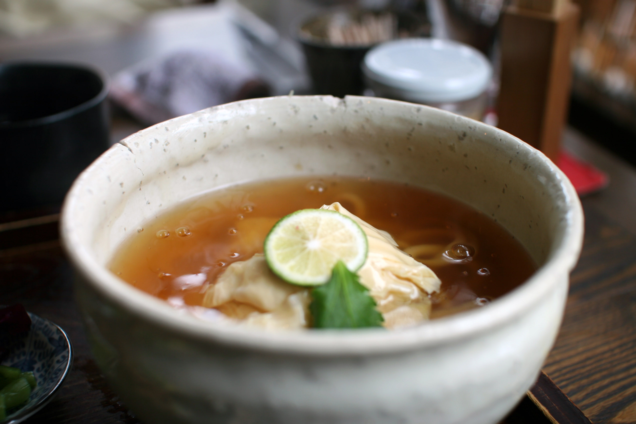 Ankakeya Ashiya, Hyogo Japan